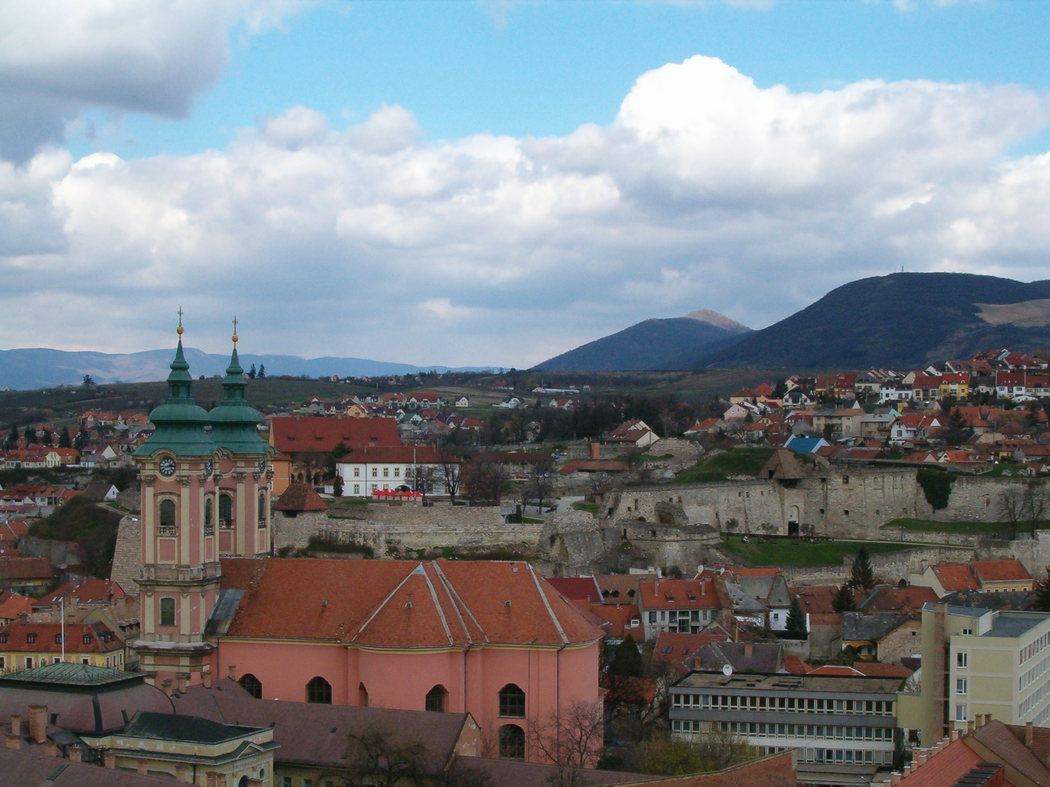 Eger látképe